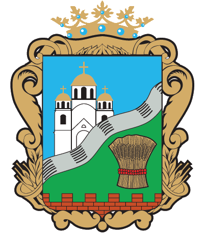 Герб Баришівського району